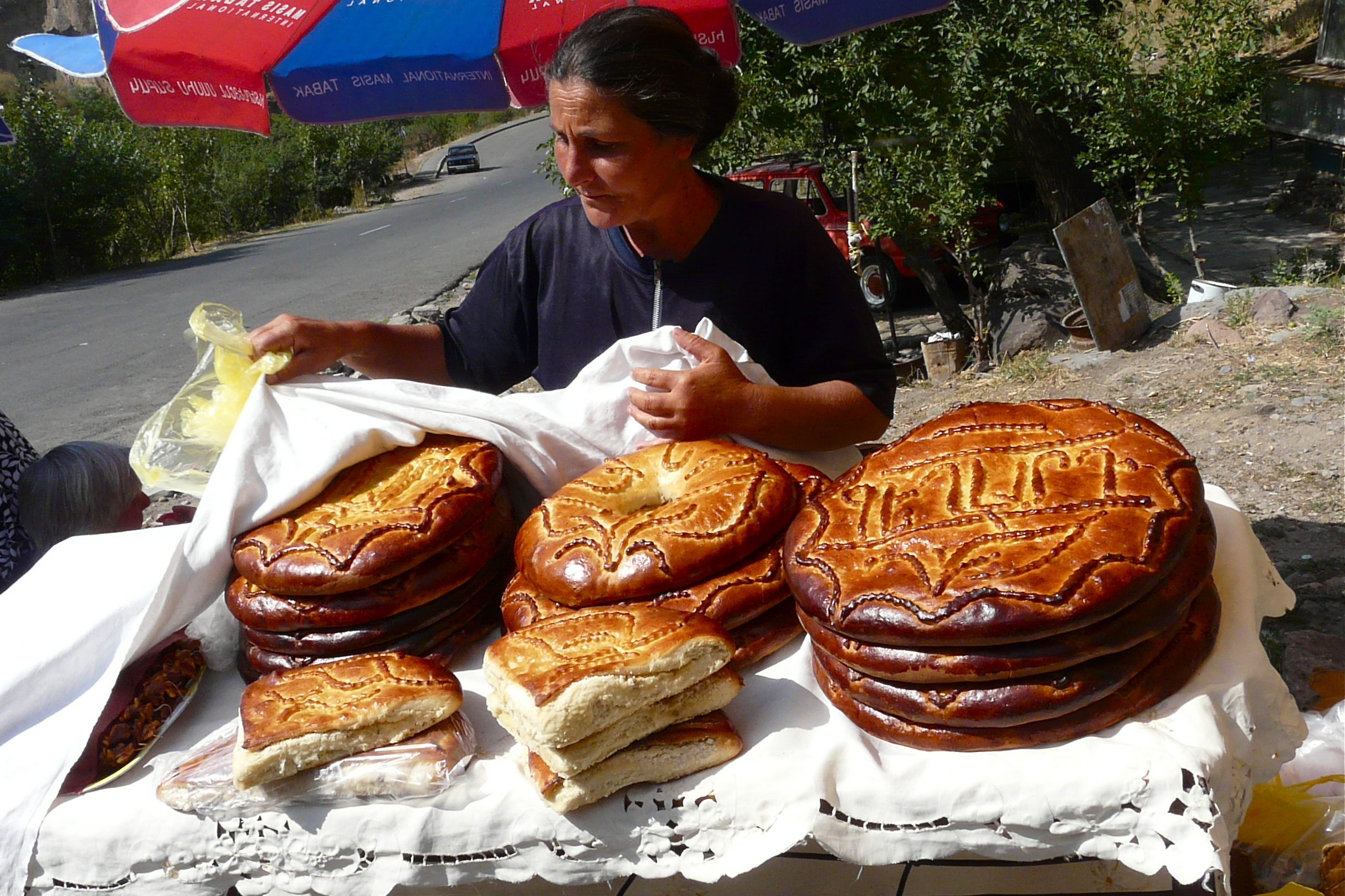 Een lekker, vers gebakken en mals stukje suikerbrood? Alleen te verkrijgen aan het holenklooster Geghard!